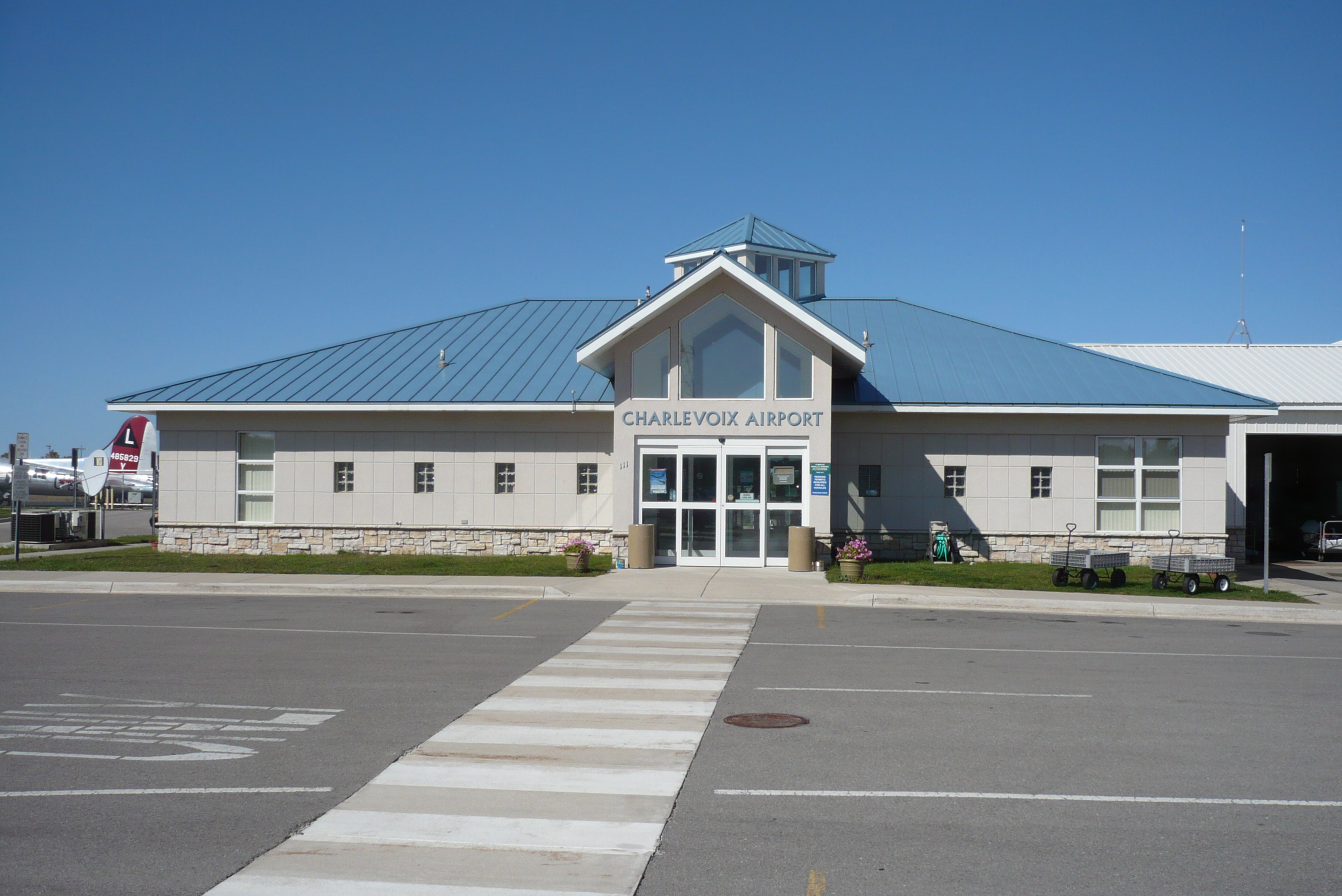 Charlevoix Municipal Airport